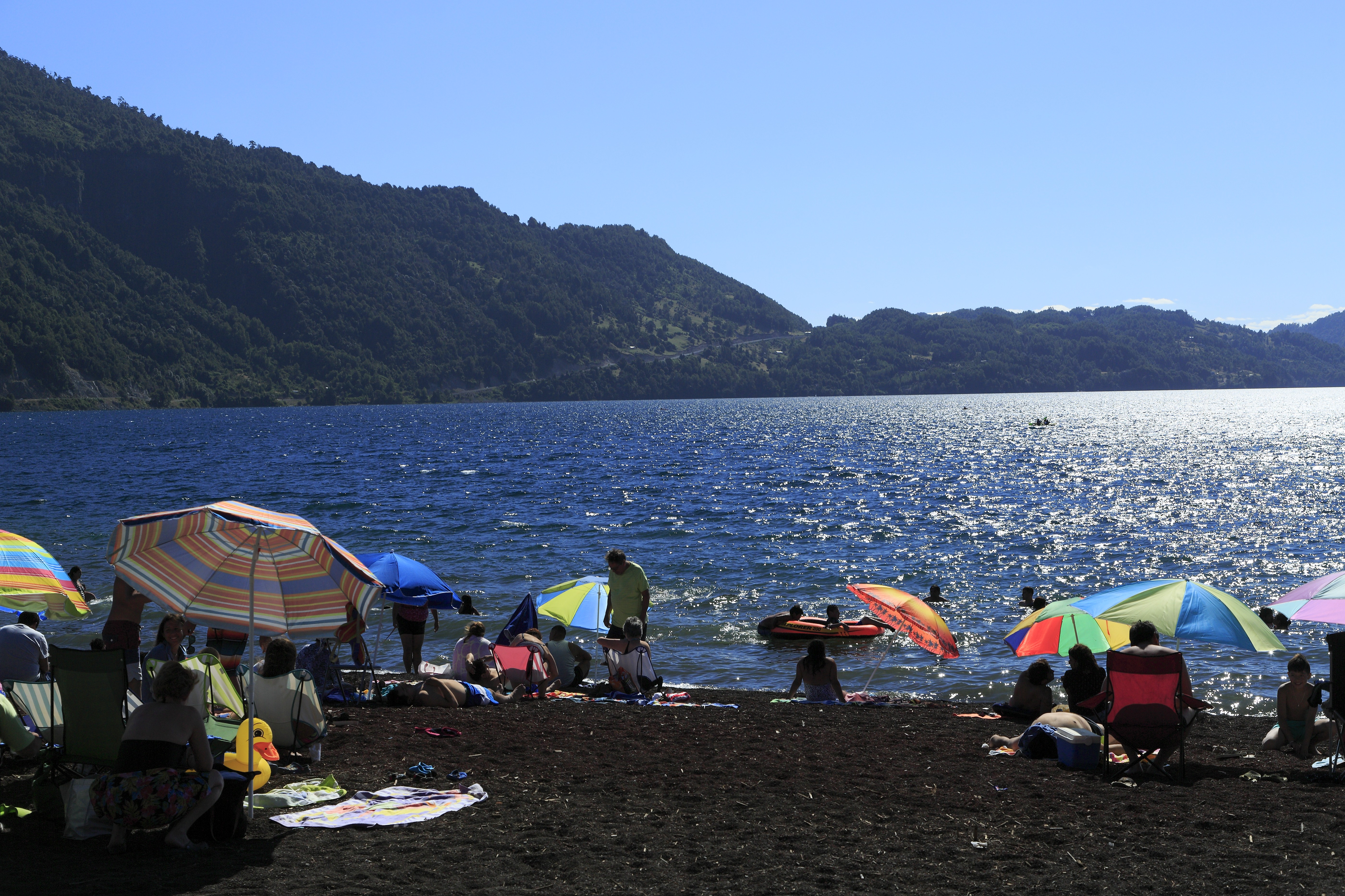 Am Ostufer des Lago Calafquén, am Hang im Hintergrund und den Berg kräftig hoch verläuft die Straße 203 CH nach Panguipulli.